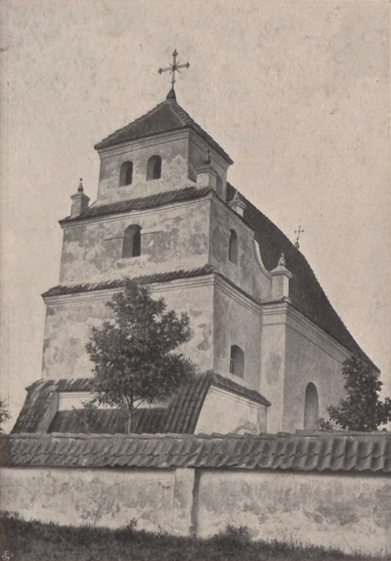 Беларуская (тарашкевіца): Асташын (Astašyn). Кальвінскі збор